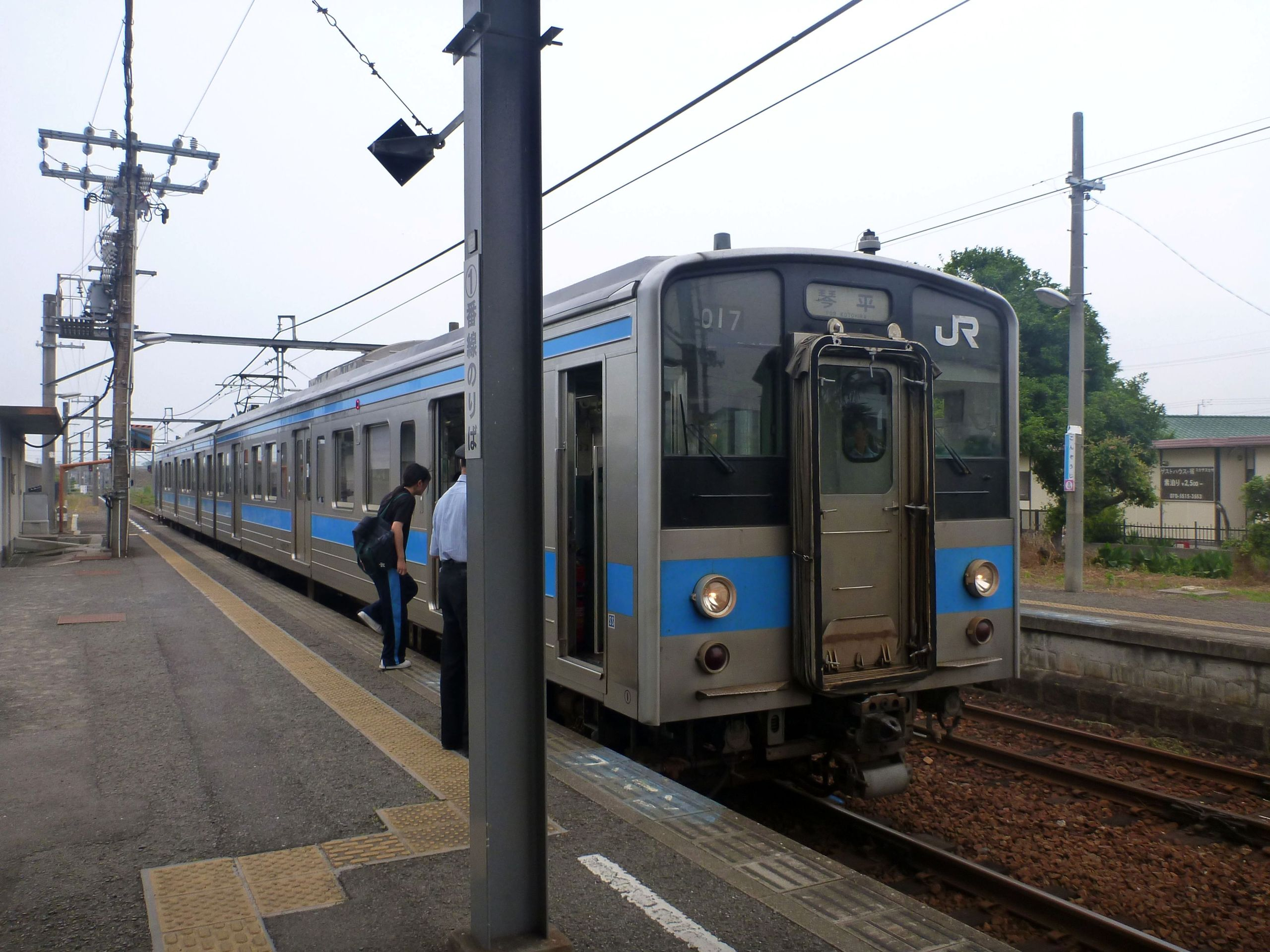 Konzoji Station, JR